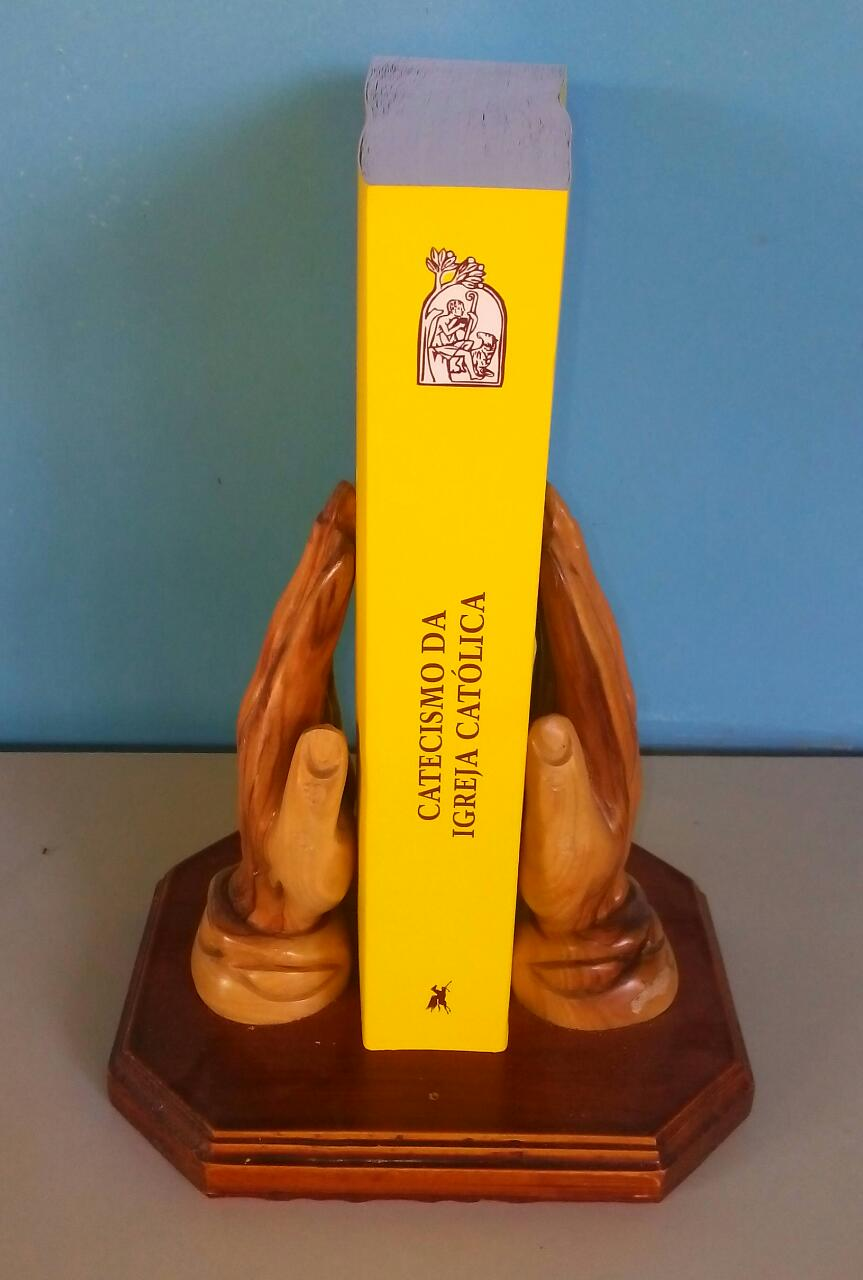 Mão em marcenaria como suporte porta livro.